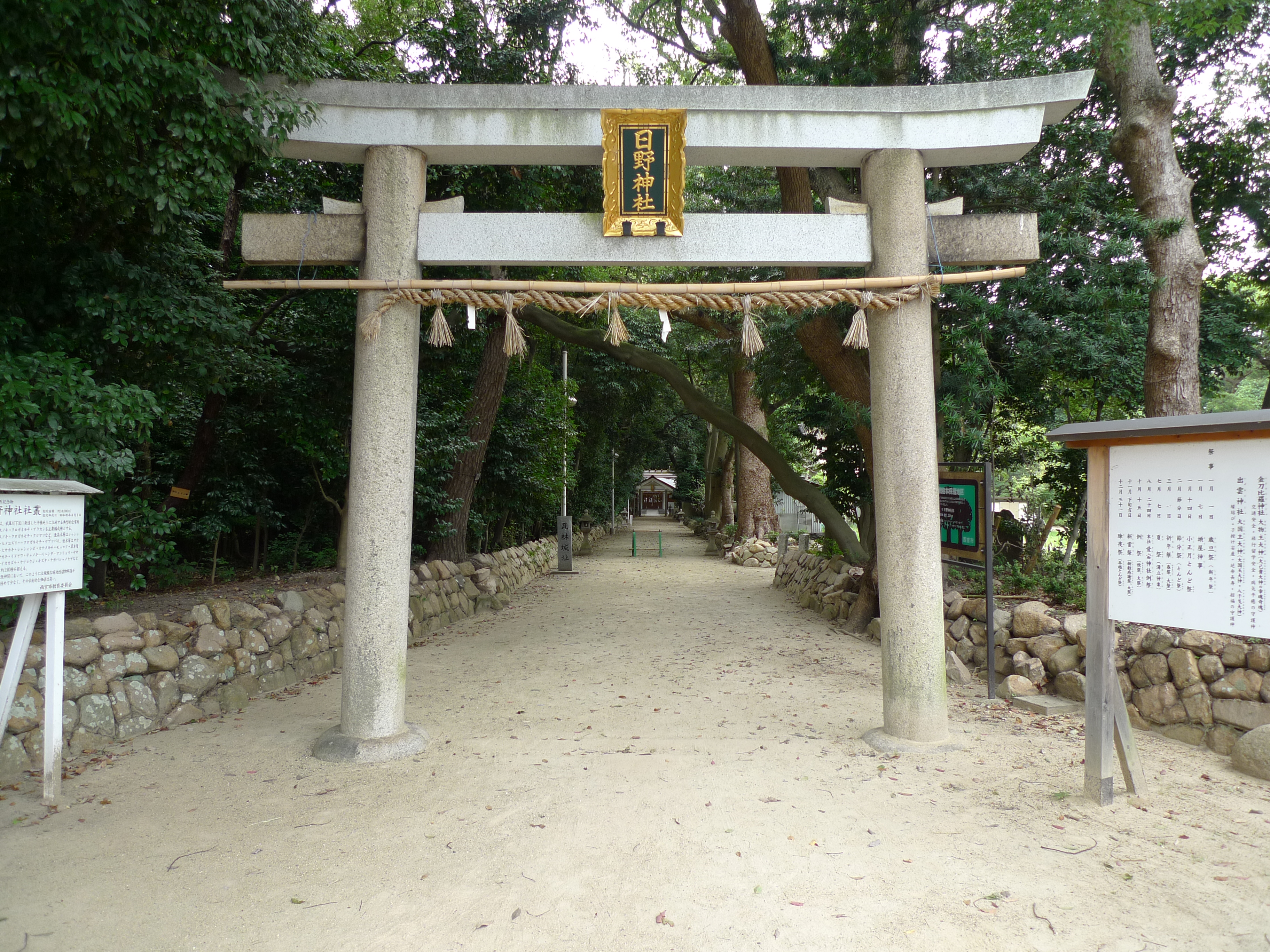 日野神社 鳥居